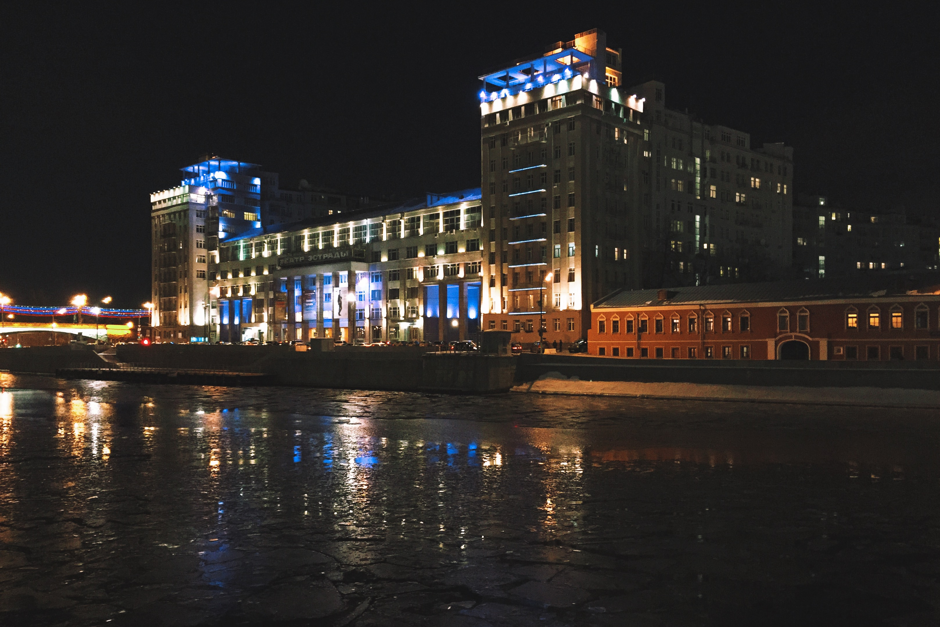 Берсеневская набережная. Дом на набережной